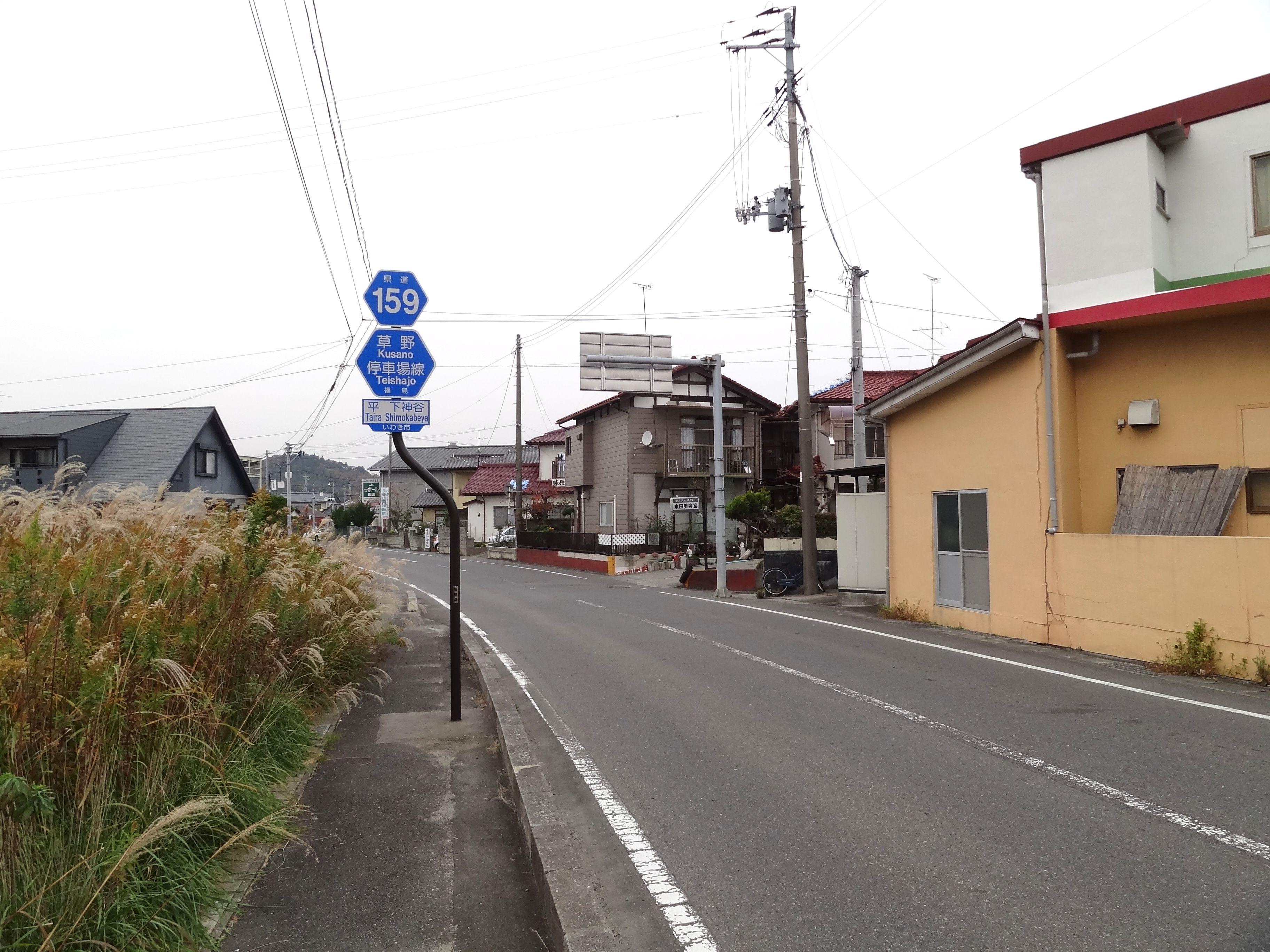 福島県道159号草野停車場線 いわき市平下神谷付近